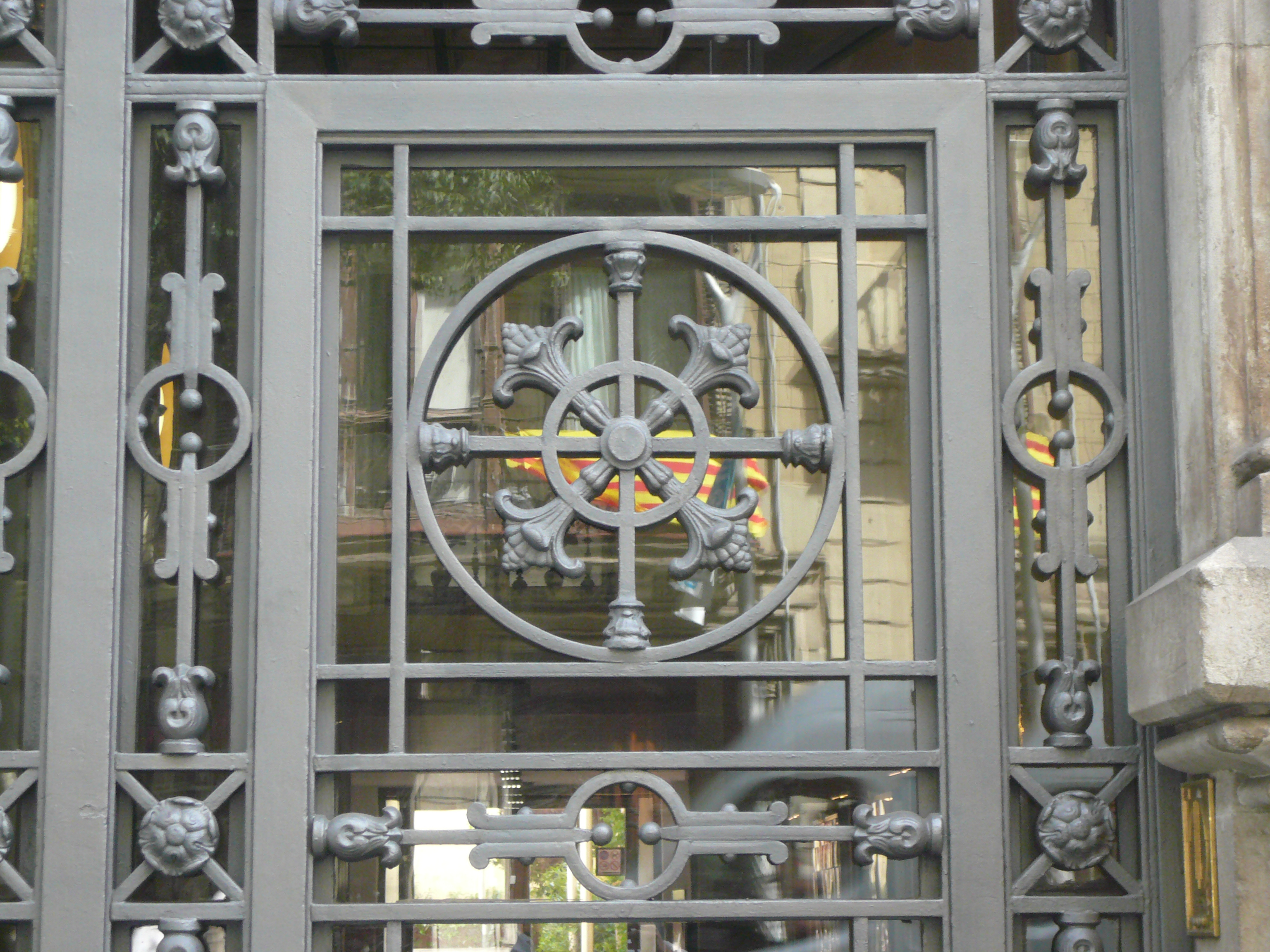 Casa Elizalde, o Casa Jaurés. C. València, 302 (Barcelona). Object location41° 23′ 40.21″ N, 2° 09′ 57.29″ E